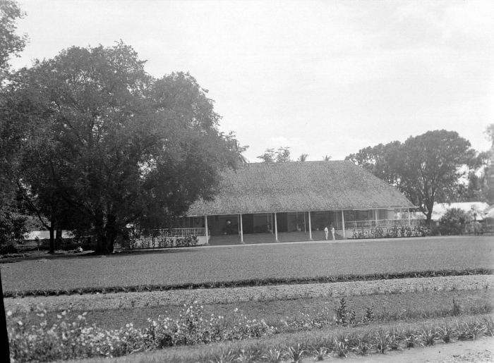 Negatief. Administrateurshuis van de Suikeronderneming Djatibarang, Tegal